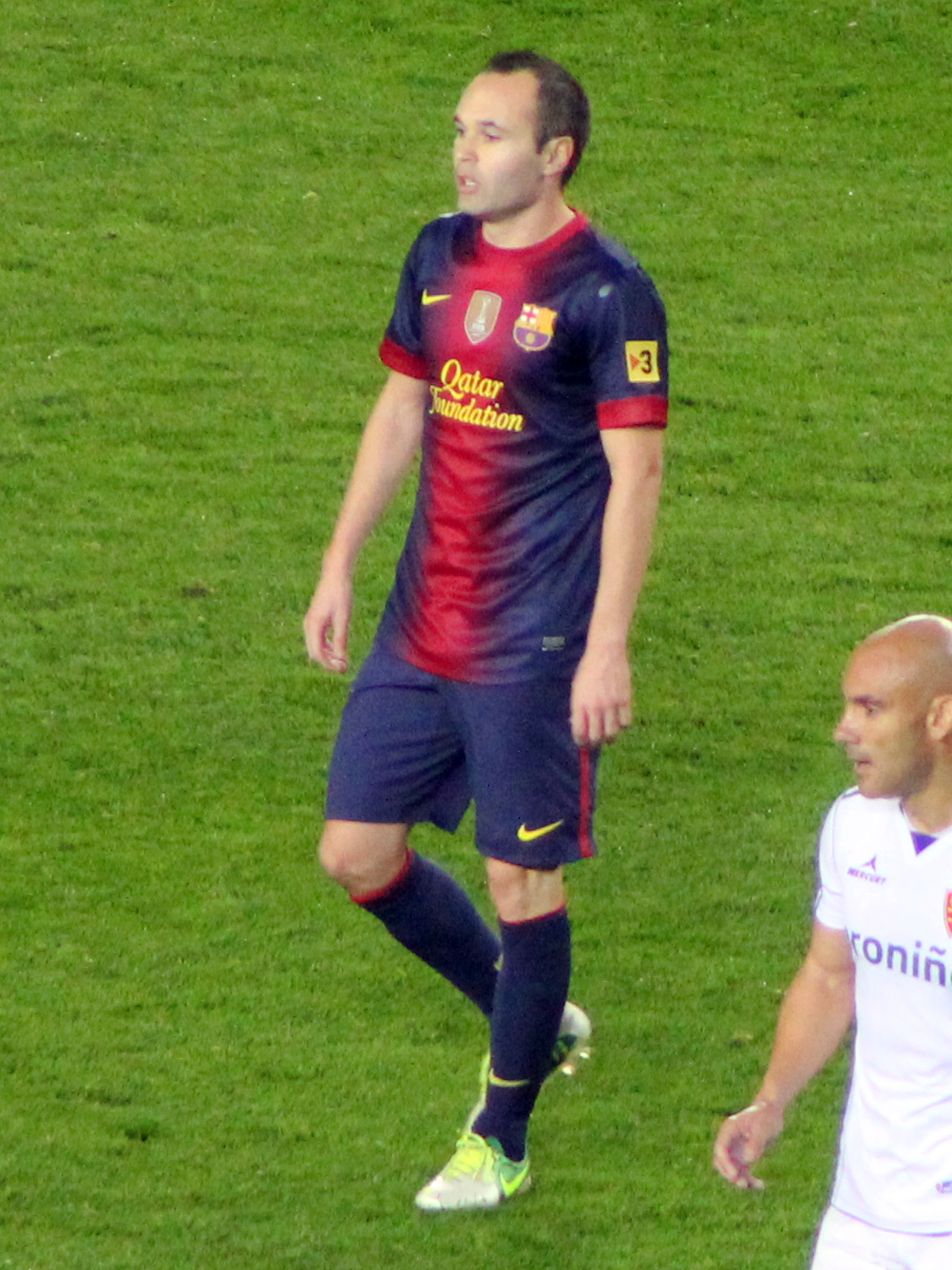 Foto realizada por Javier Segura (@castroquini en Twitter)